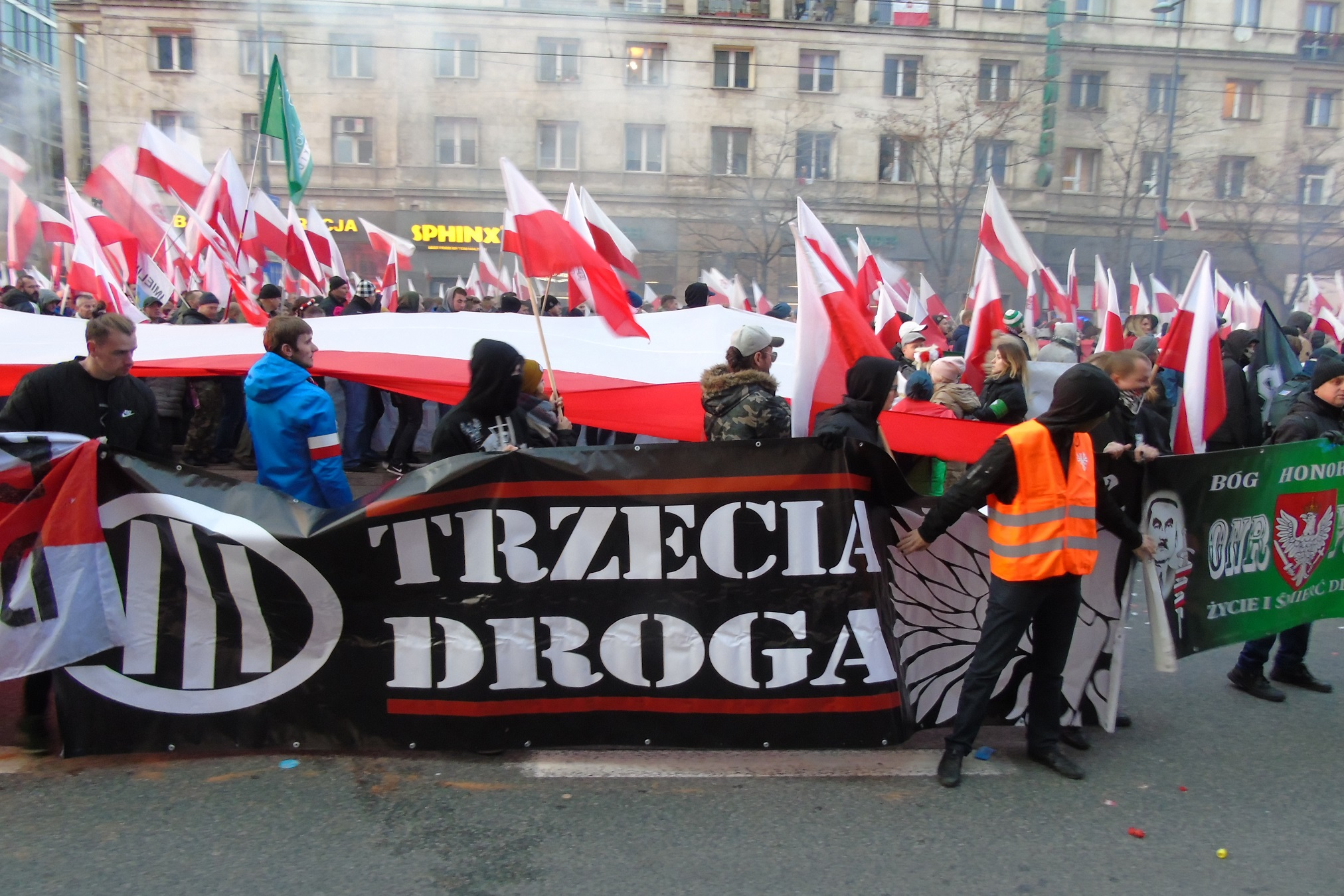 Baner zwolenników terceryzmu na Marszu Niepodległości w Warszawie (11 listopada 2019 r.)